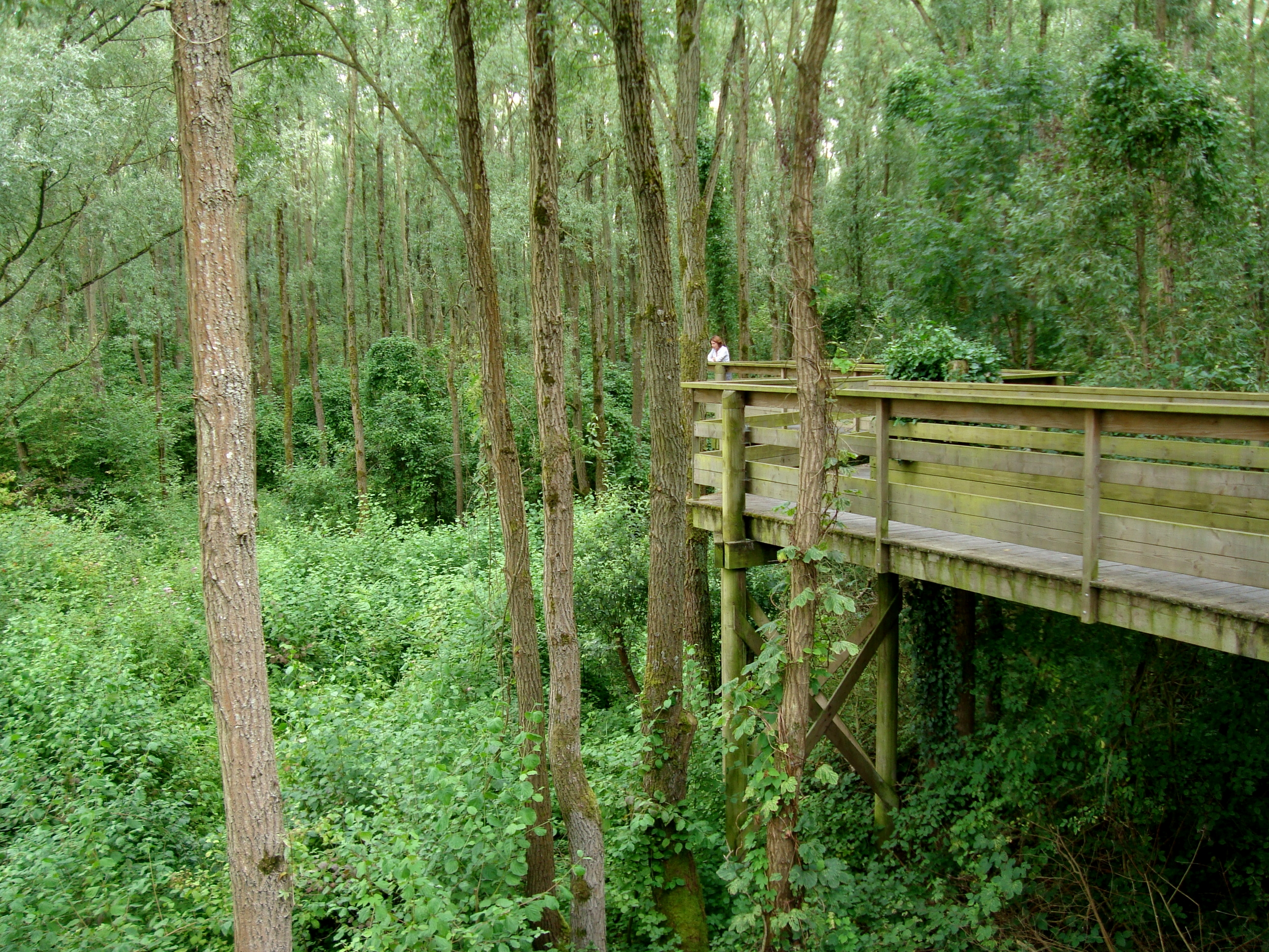 «Le perchoir», parcours permettant d'évoluer dans les arbres à environ 3 m de hauteur dans le site de la Gite, dans le Parc de la Deûle à Santes (Nord). Parmi les plantes grimpantes on observe le lierre et du houblon sauvage (visible sur l'un des troncs au premier plan de la photo), moins fleuri et moins parfumé que le houblon cultivé, mais plus résistant aux pucerons et parasites du houblon cultivé